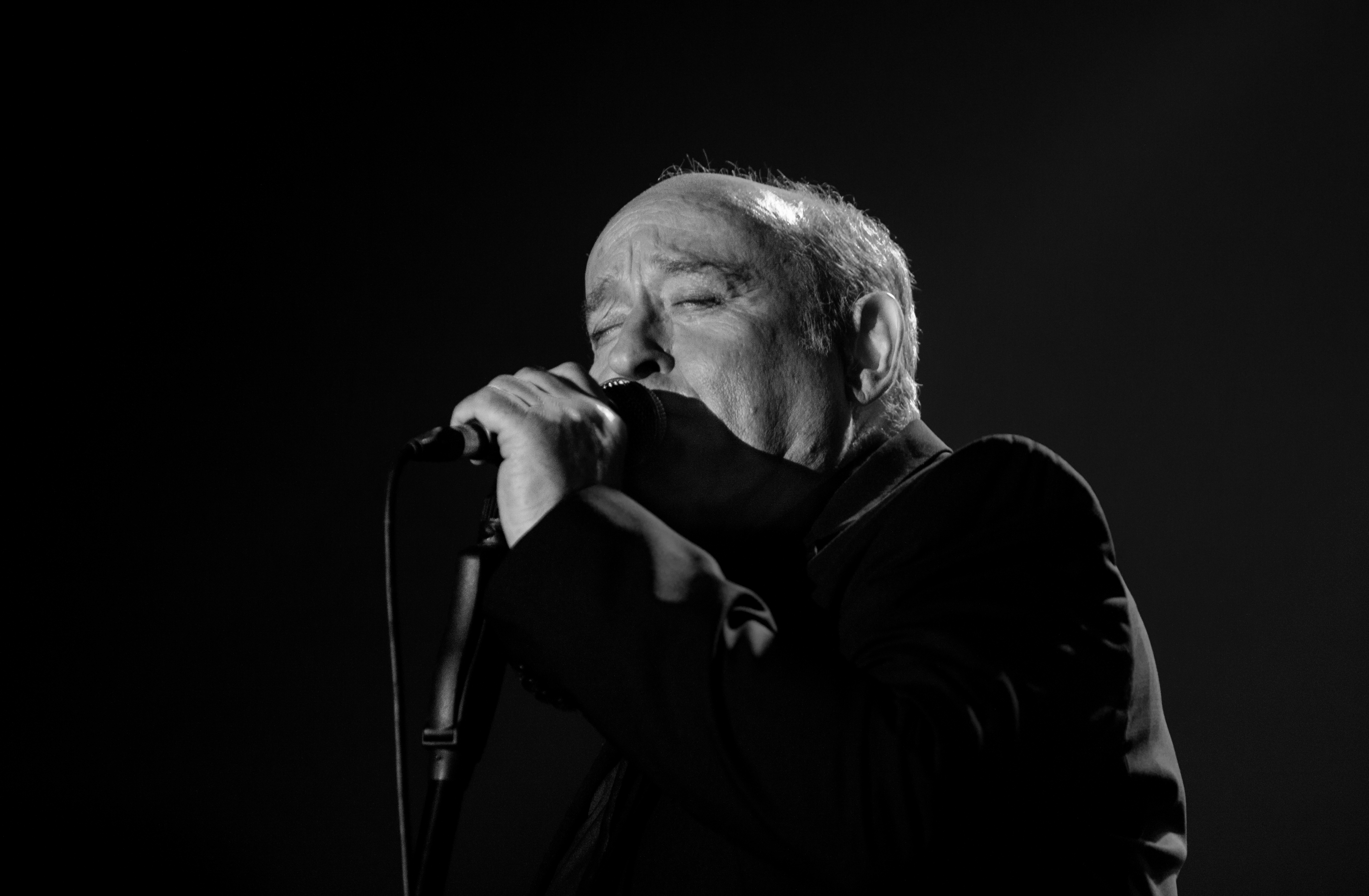 Saveur Jazz Festival /Segré en Anjou Bleu/ 07/10/2017